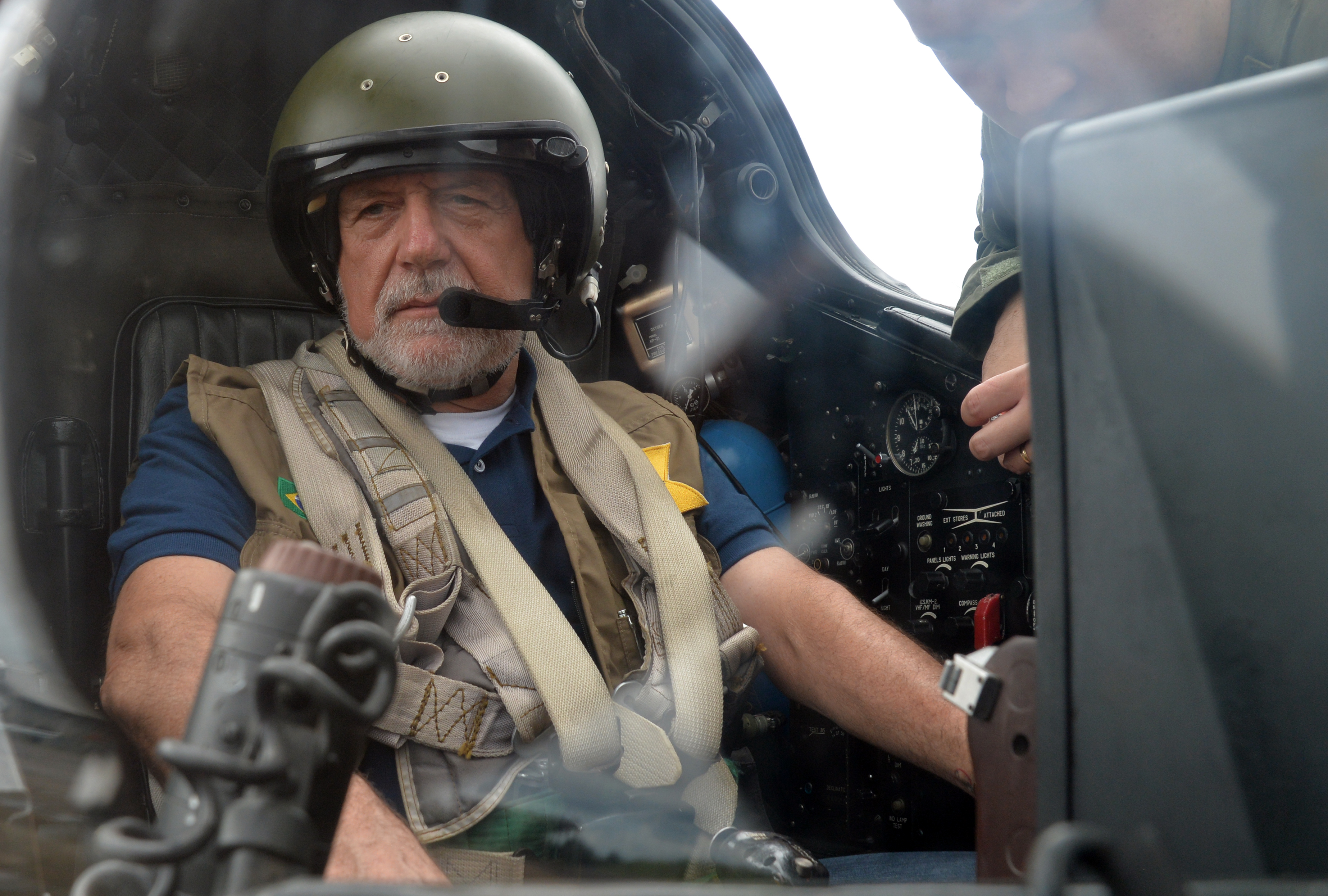 24/03/2015, Porto Velho - RO Fotos: Jorge Cardoso